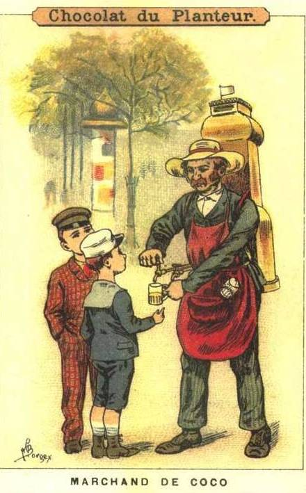 Un marchand de coco verse à boire à des enfants.